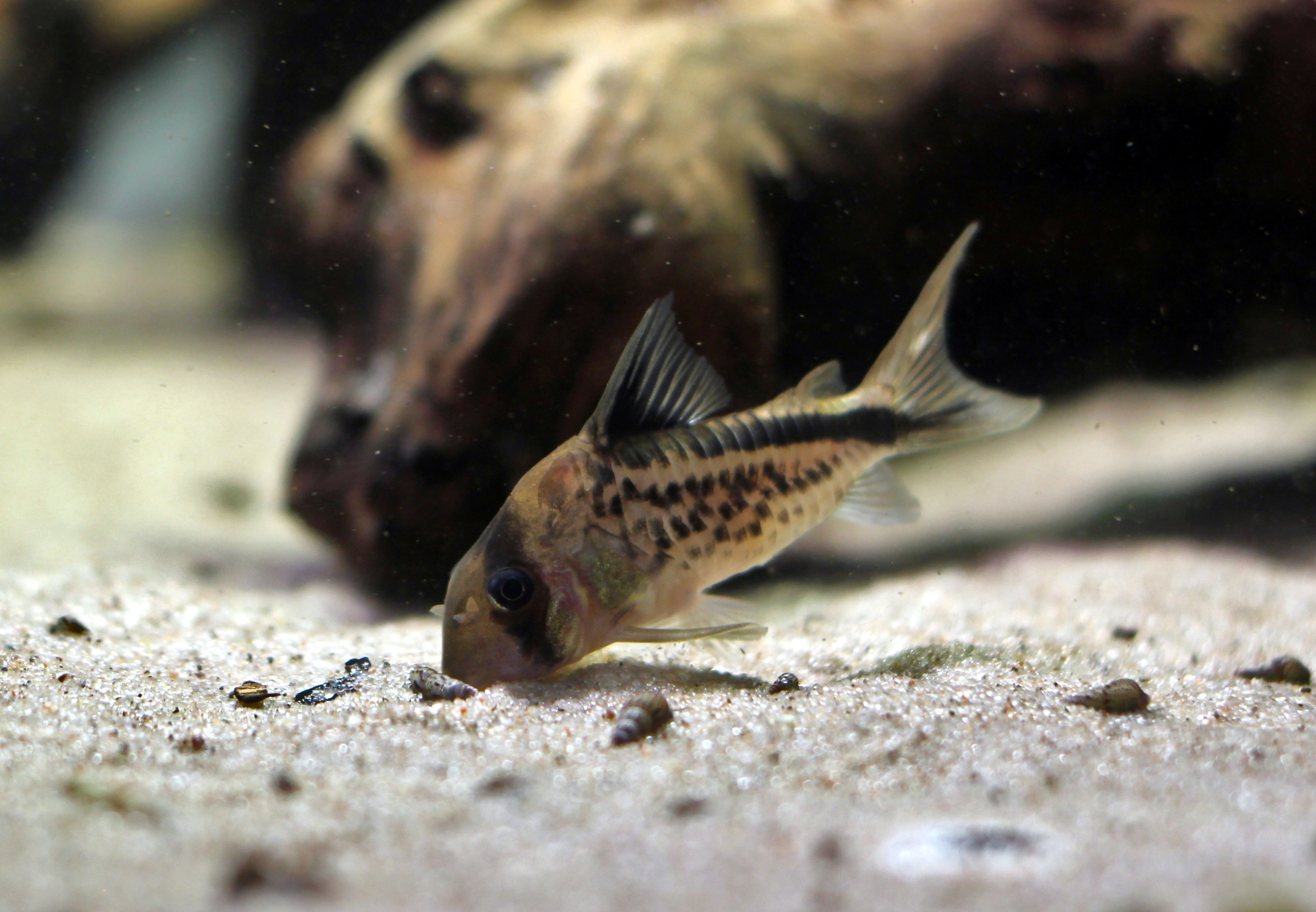 Corydoras loxozonus